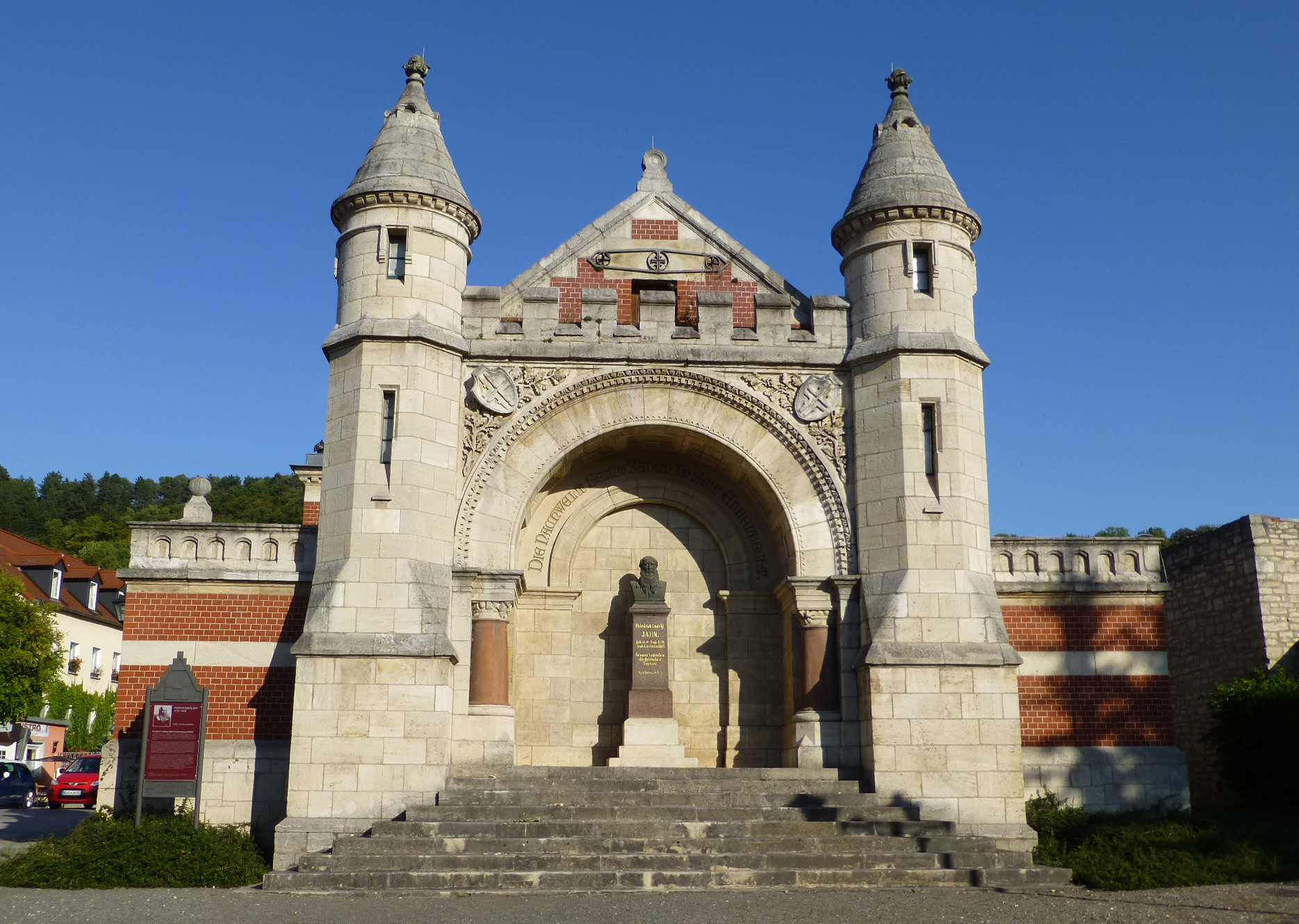 Monument dédié à Friedrich-Ludwig JAHN (1778-1852), Freyburg (Unstrut), Saxe-Anhalt.